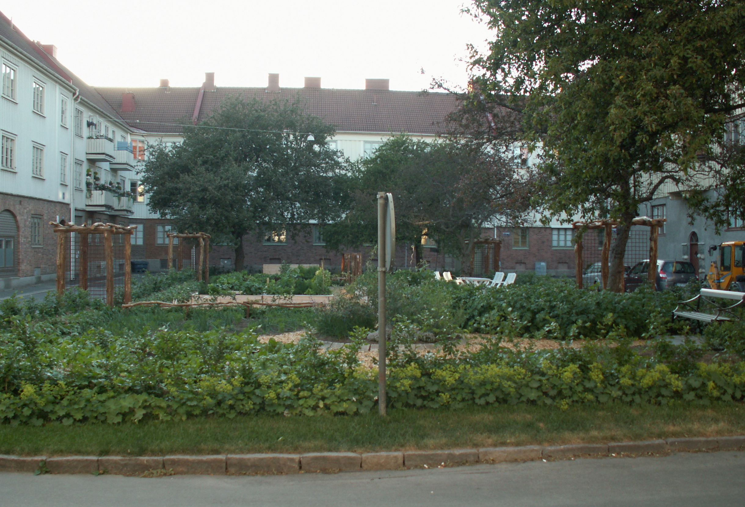 Stadsnära odling i "Engelska parken", vid Carnegiegatan/Svanebäcksgatan i Kungsladugård i Götenborg. Juni 2014.